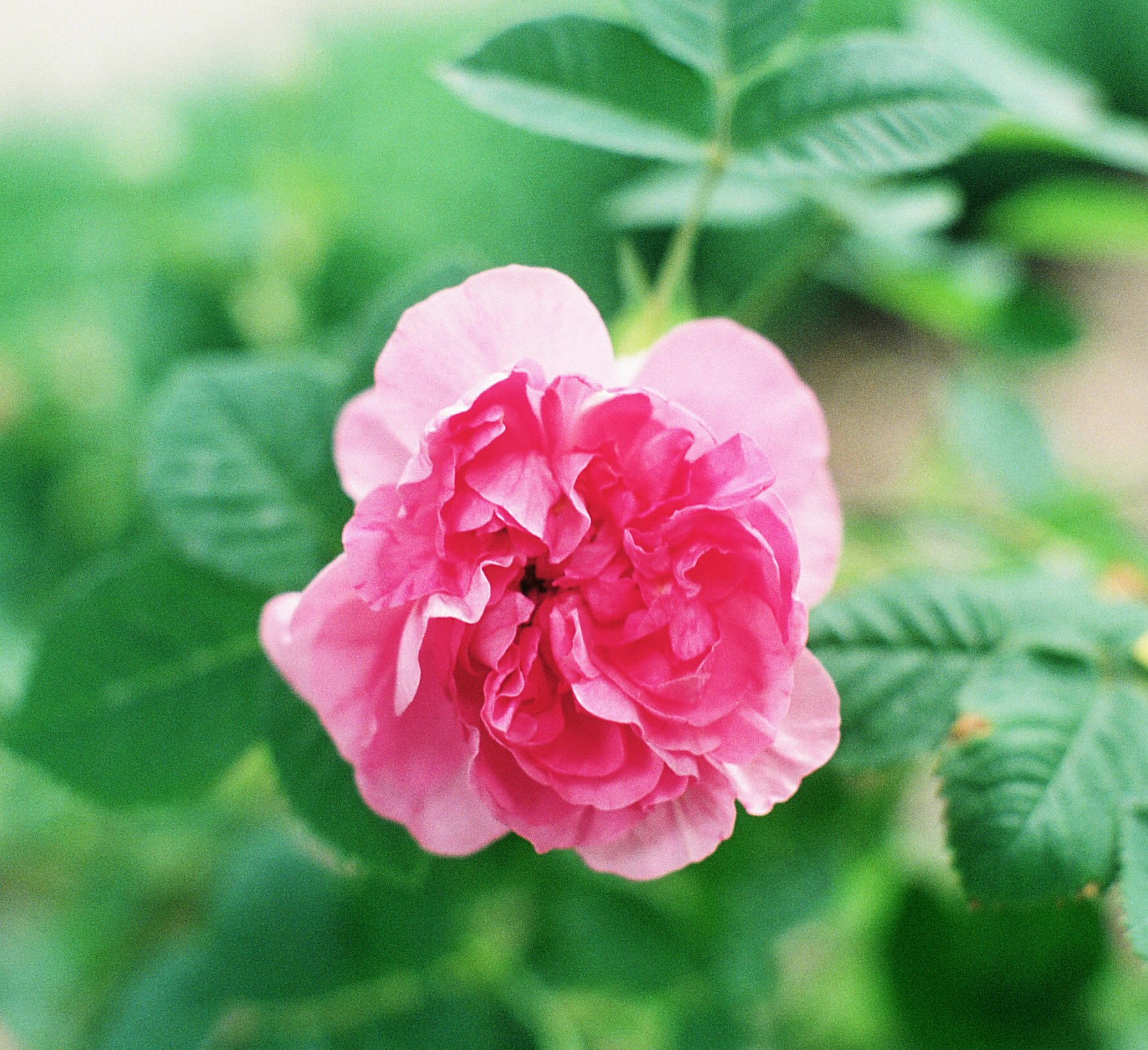 Rosa 'Empress Josephine', gr. Gallicas, sect. Rosa. Real Jardín Botánico, Madrid